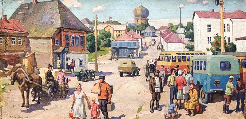 Nr 13, Viktor Malinovskiy 1968, Zentrum von Kovernino, Öl auf Leinwand, 50cm x 98cm